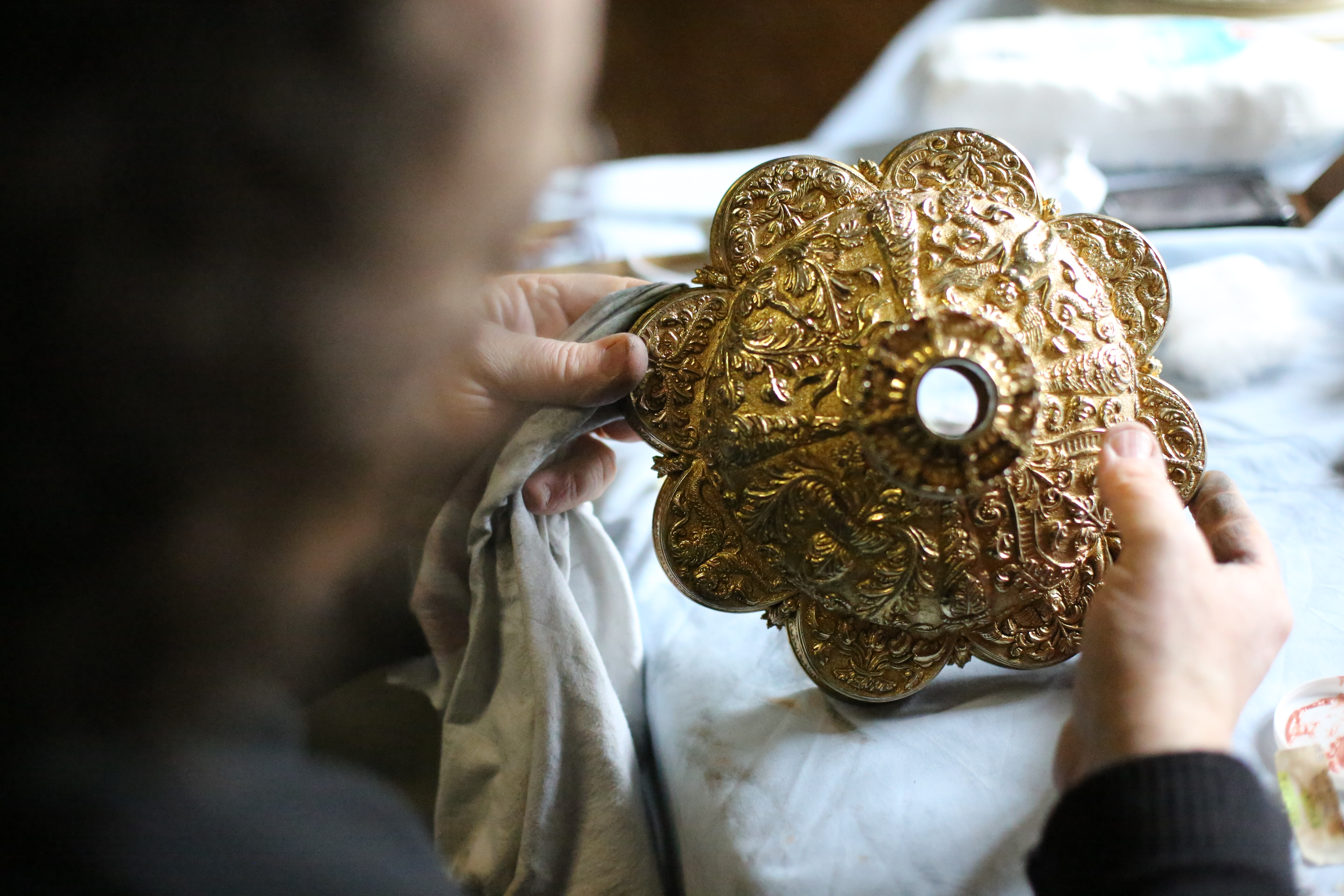 Christophe Evellin nettoyant le calice de Guillaume Floch, pièce majeure du trésor de Saint-Jean-du-Doigt